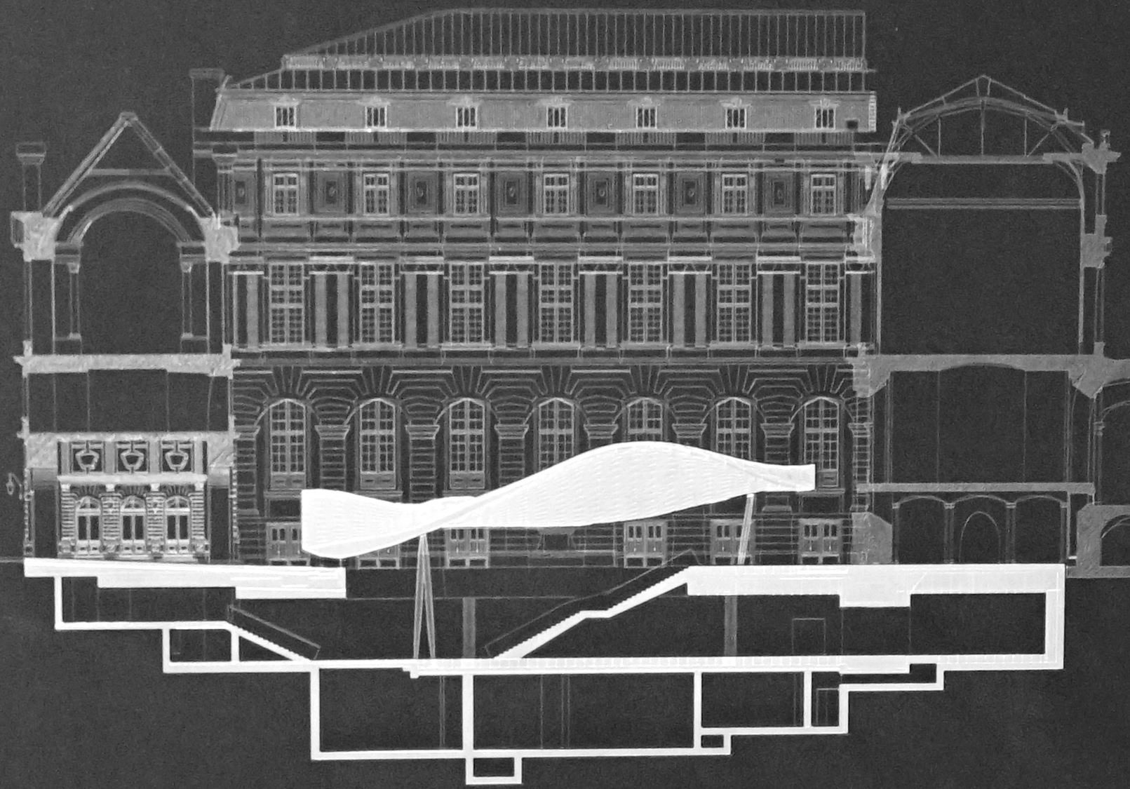 musée du Louvre.